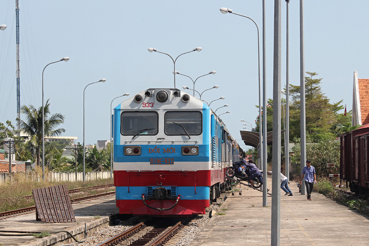 CKD7F